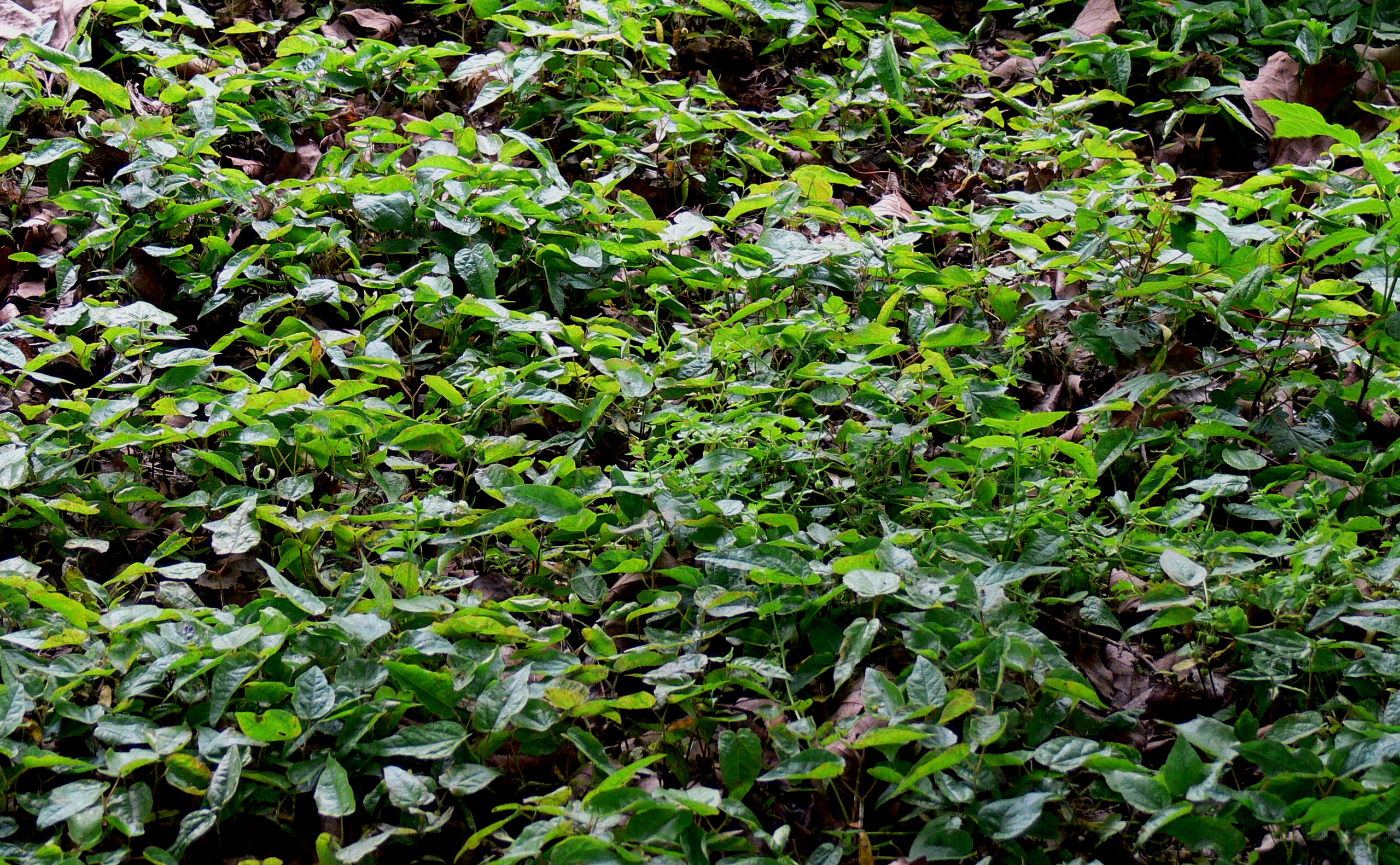 Tapis de jeunes plants de Acer platanoides (pour la plupart) et Acer campestre (à l'extrême droite), régénération naturelle, Nord de la france, mai 2002.